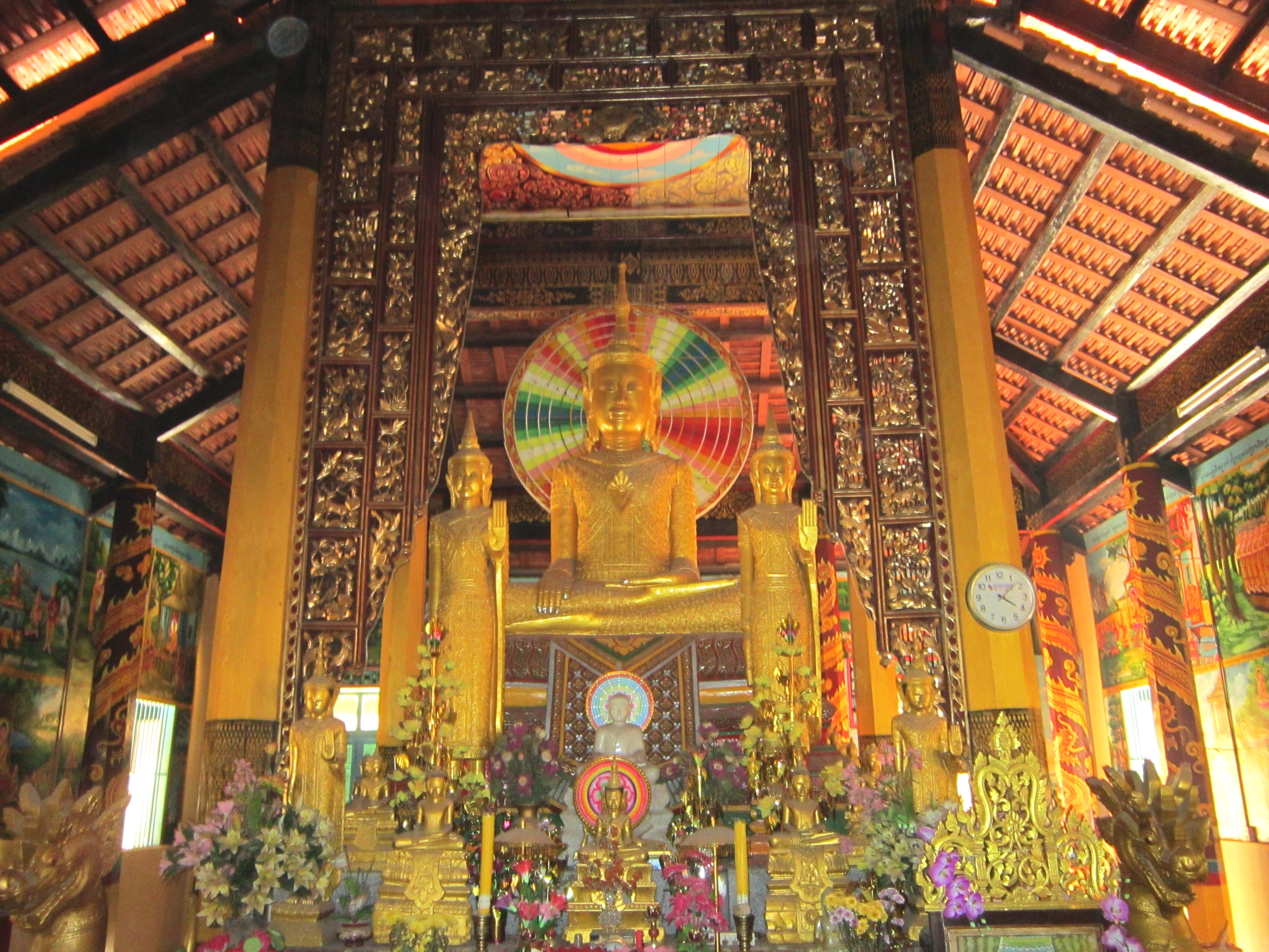 Tượng Phật Thích Ca trong chùa Âng (tên Khmer là Angkorajaborey). Đây là một ngôi chùa cổ trong hệ thống chùa Khmer của tỉnh Trà Vinh, Việt Nam.